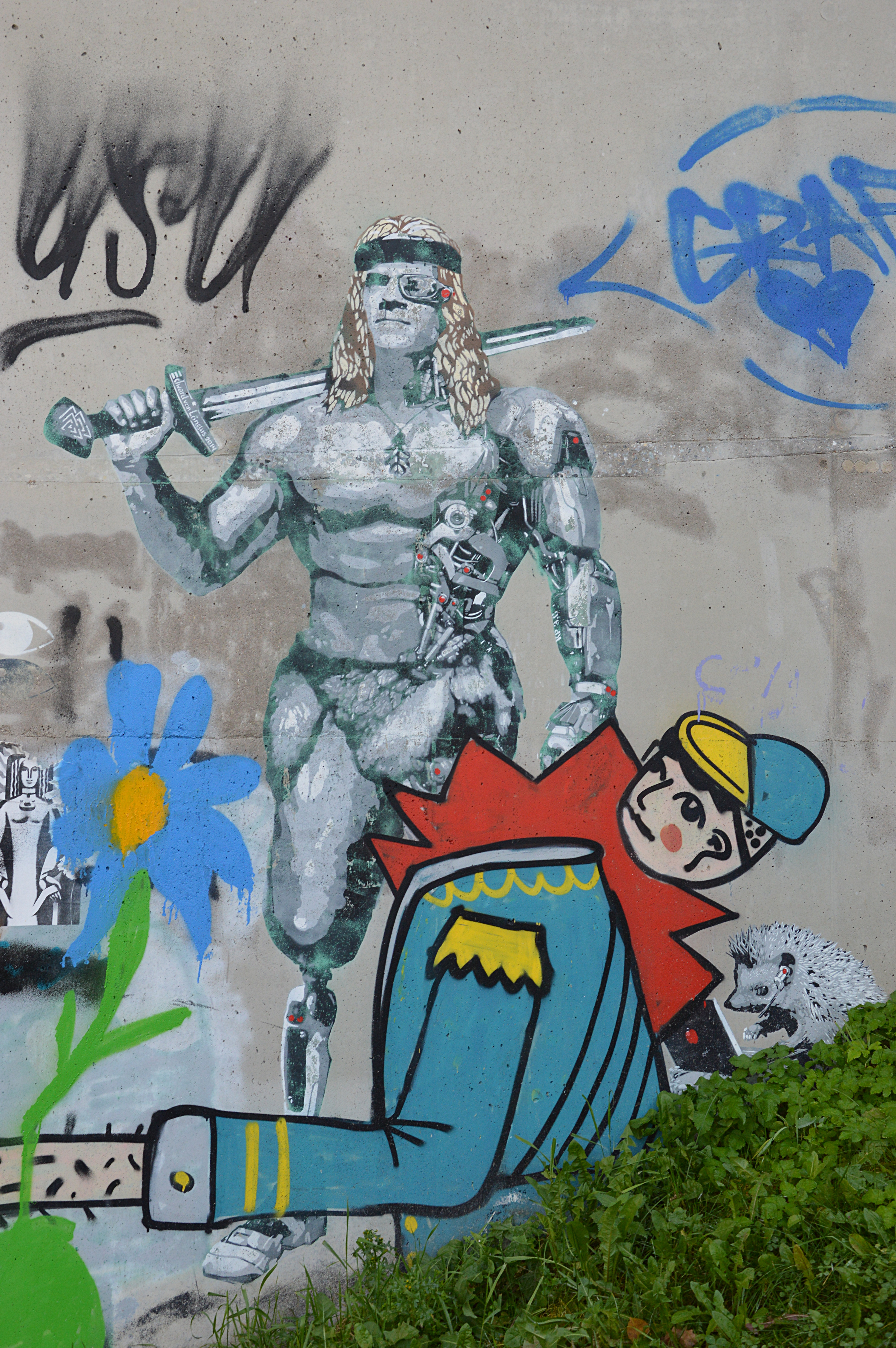 Edward von Lõngus, "Kalevipoeg 3.0" (rohkem)